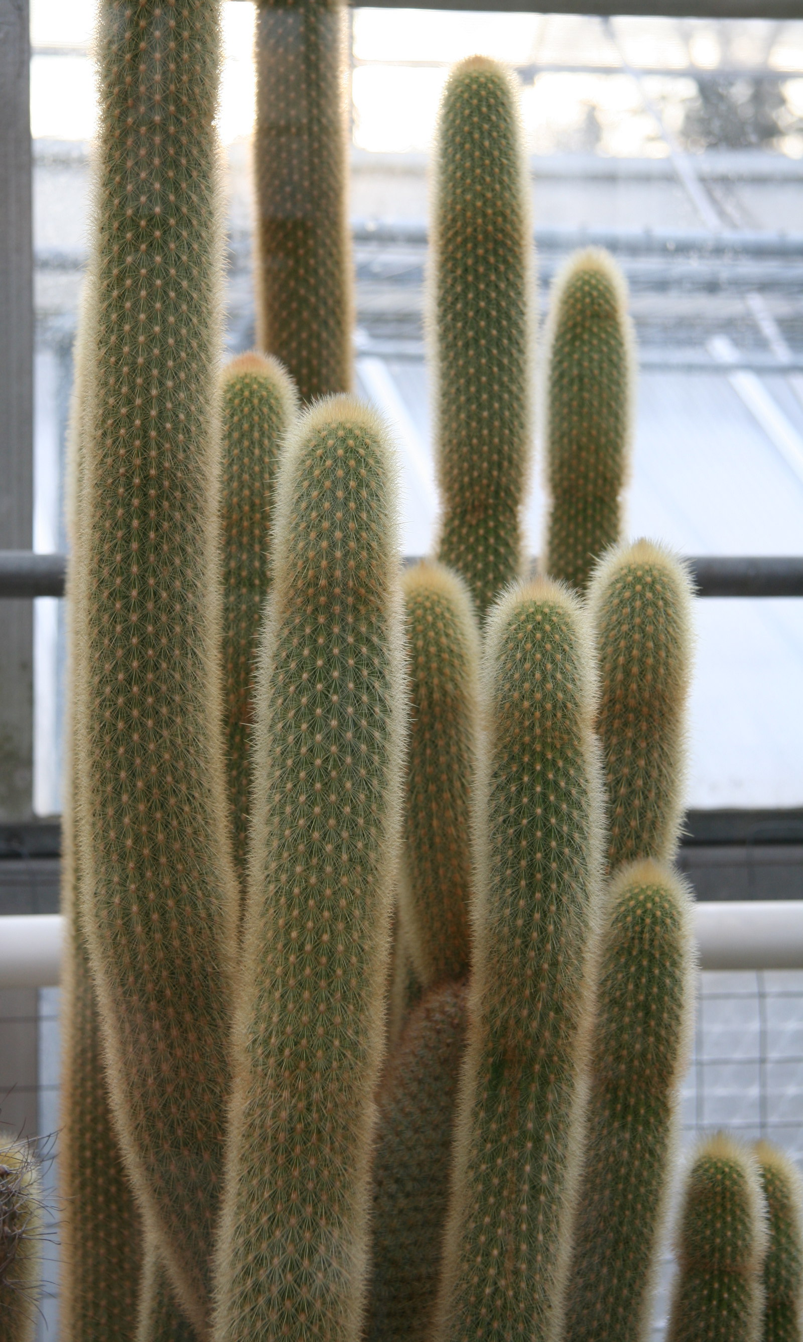 Haageocereus fascicularis im Botanischen Garten Dresden